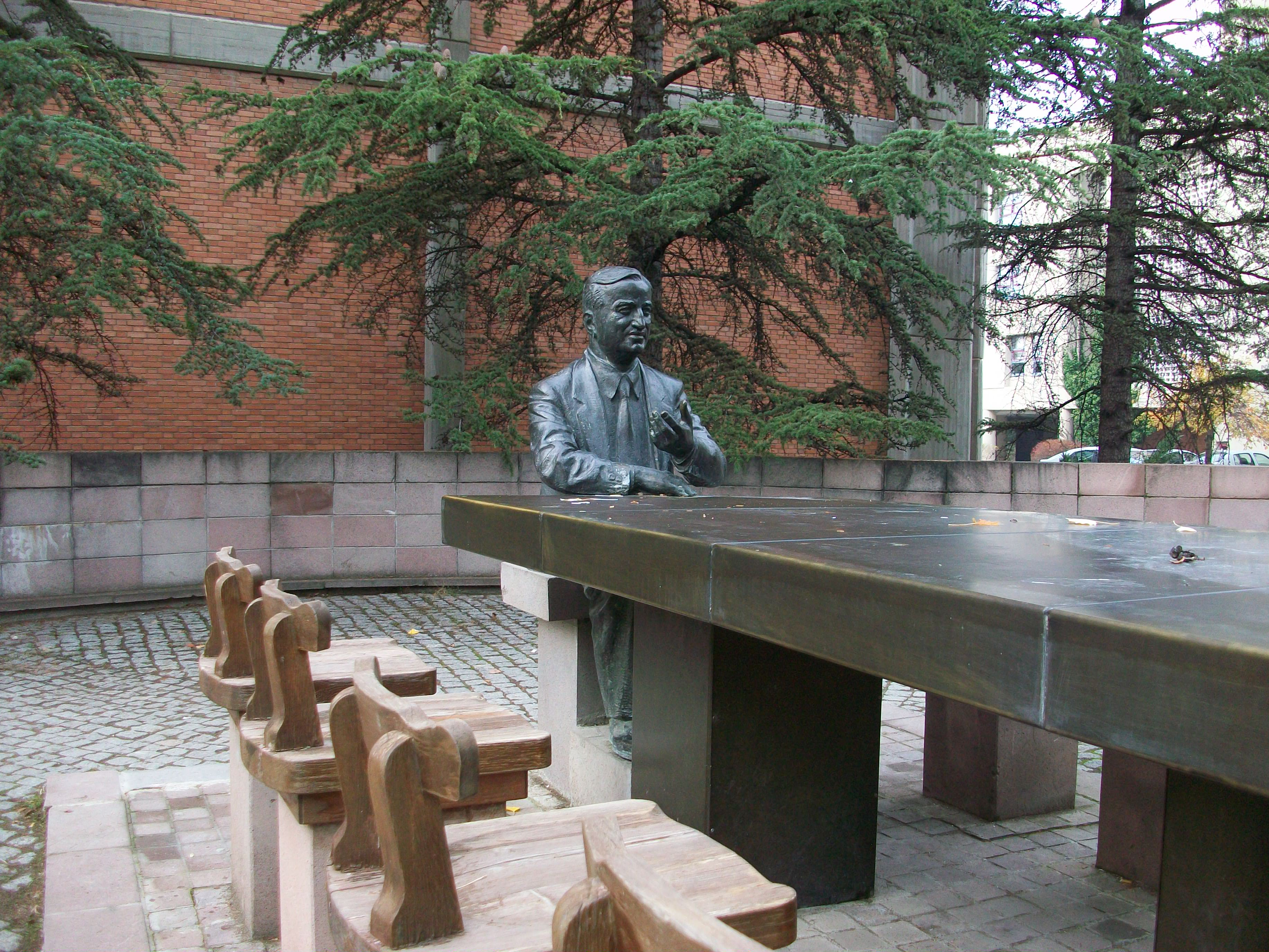 ODTÜ Endüstri Mühendisliği Bölümünün önünde bulunan